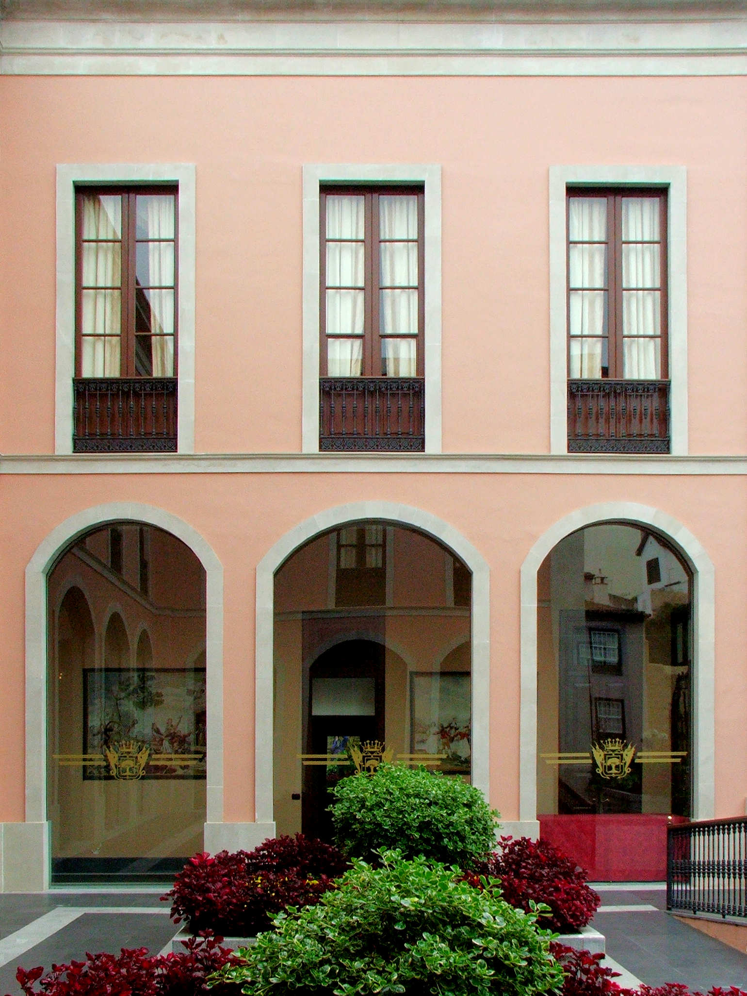 Ayuntamiento fachada sur